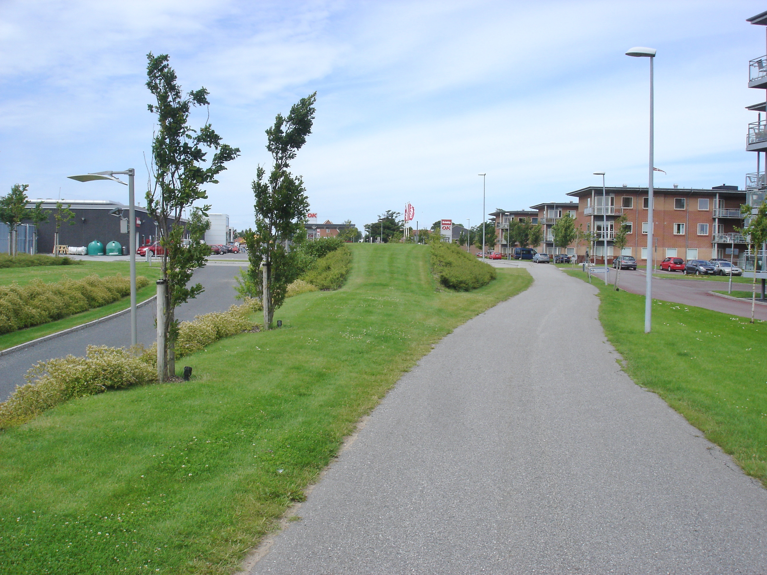 Himmerlandsstien når Banegårdsvej i Aars, hvor jernbaneknudepunktets store stationsterræn lå